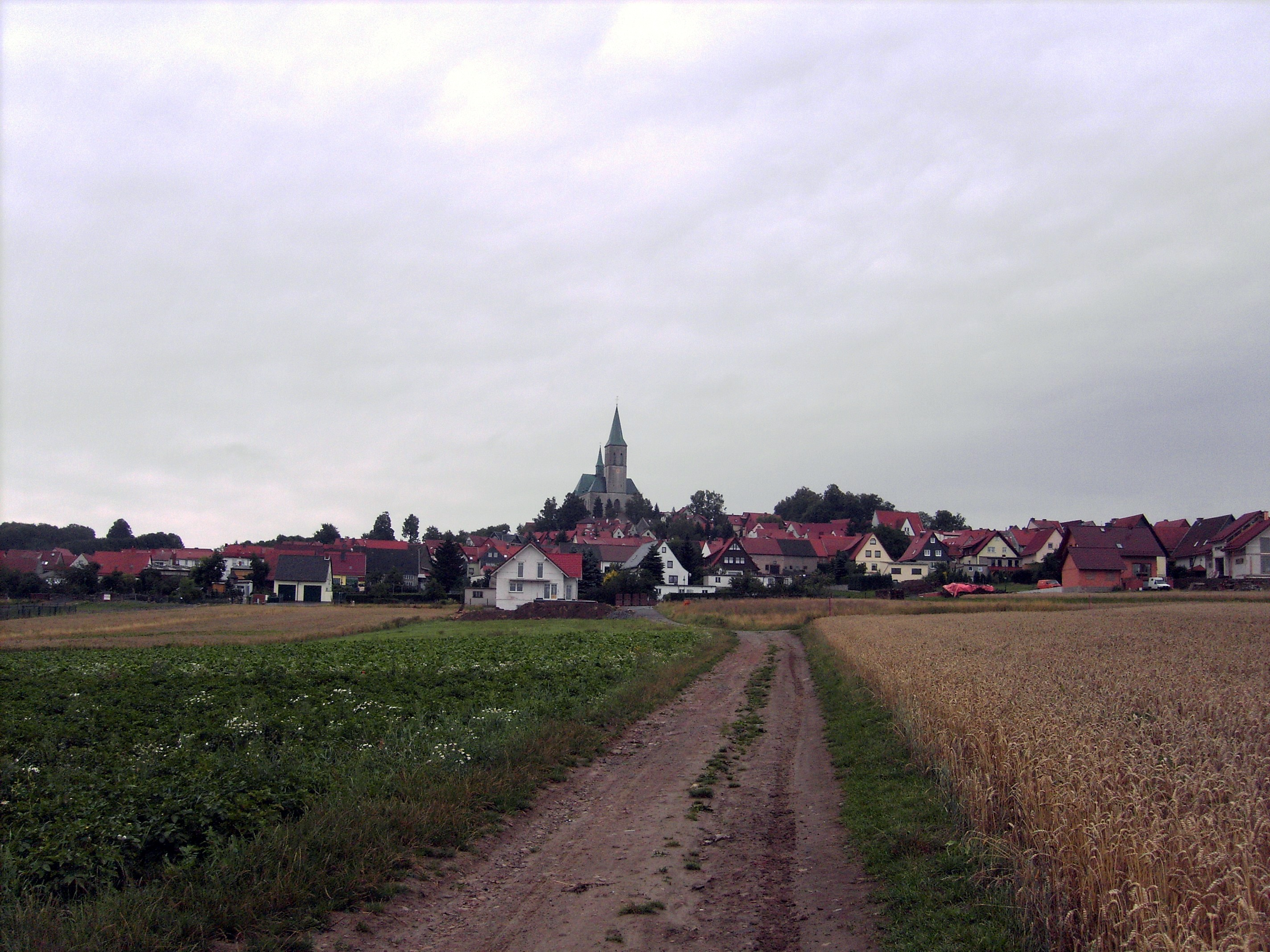 Eichsfelder Dom, Katholische Kirche St. Alban in Effelder, Eichsfeld, Thüringen, Deutschland